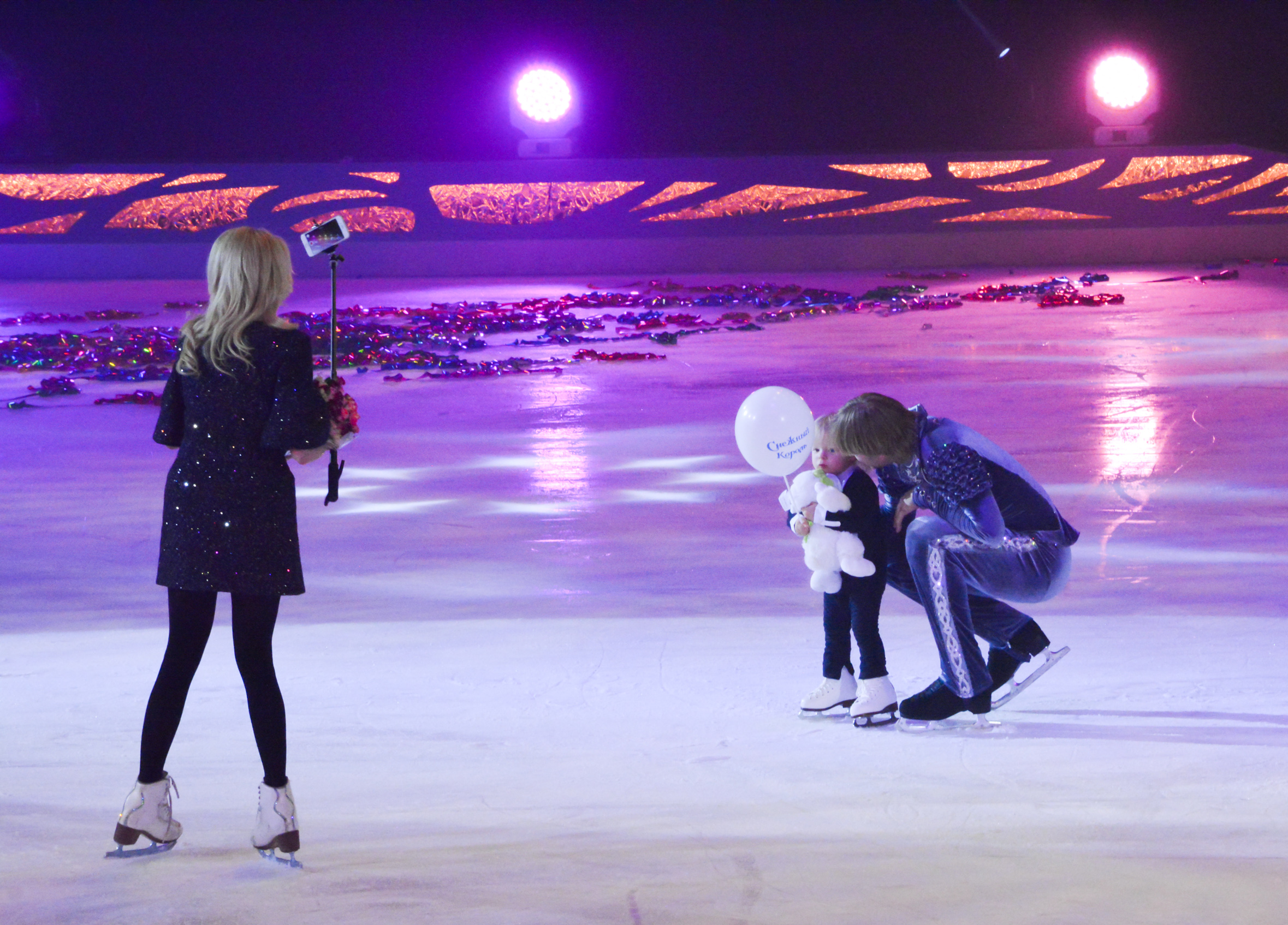 Евгений Плющенко и Яна Рудковская с сыном Александром. Ледовое шоу-сказка «Снежный Король» (Санкт-Петербург)